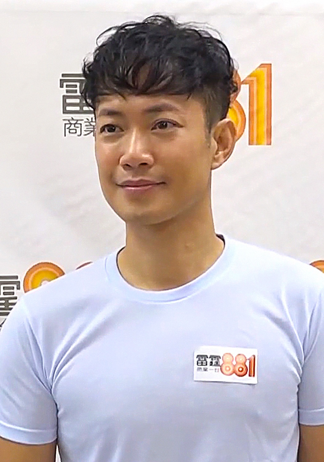 中文（香港）: 商業電台雷霆881《1圈圈》訪問